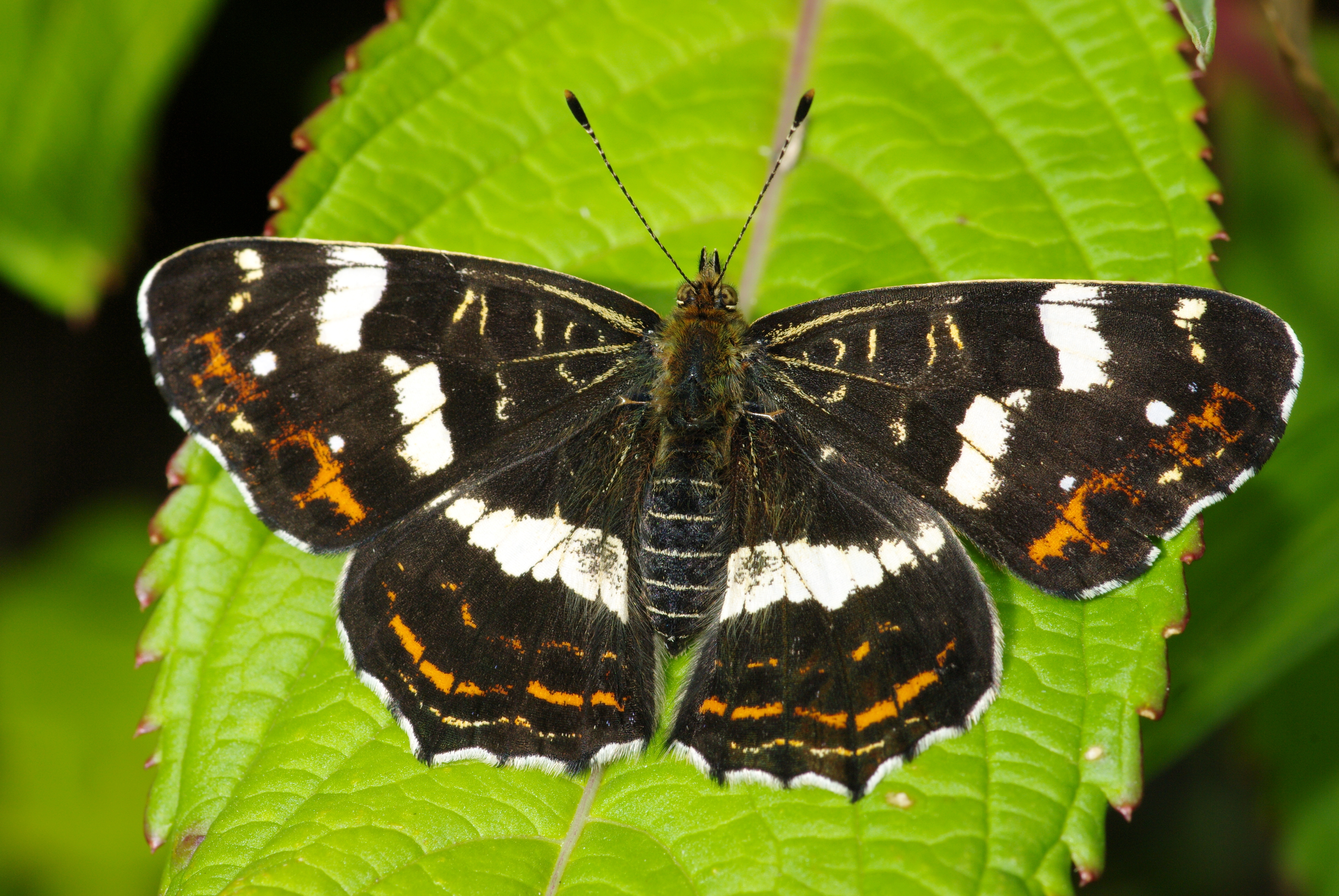 La carte géographique (Araschnia levana), sous la forme estivale dite "prorsa", photographiée à Vouneuil-sur-Vienne.